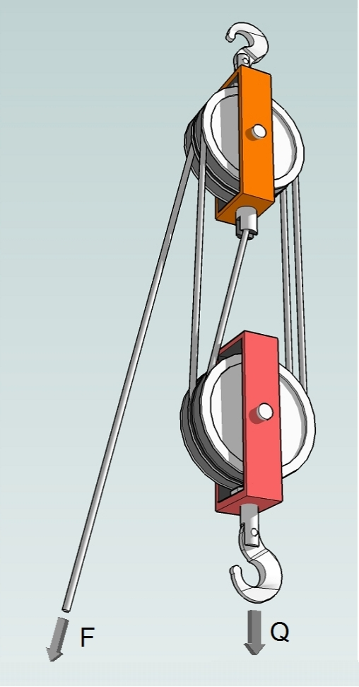 koloturnik s četiri užeta